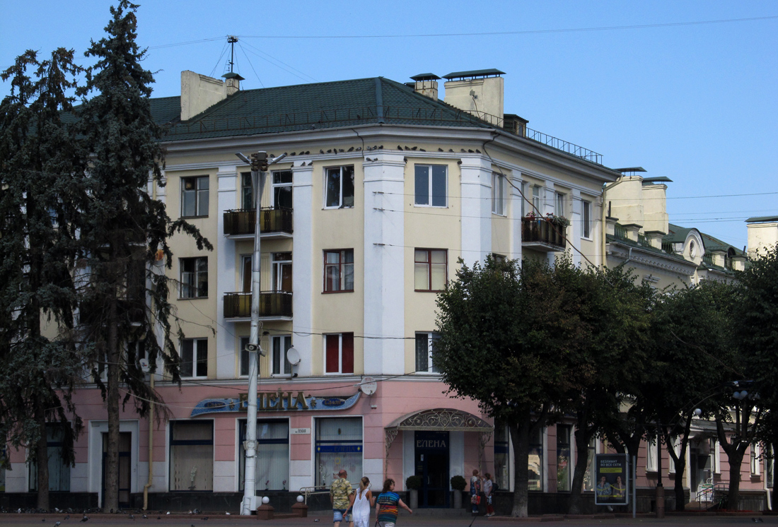 Брэст. вул. Леніна, 24 / вул. Пушкінская, 4